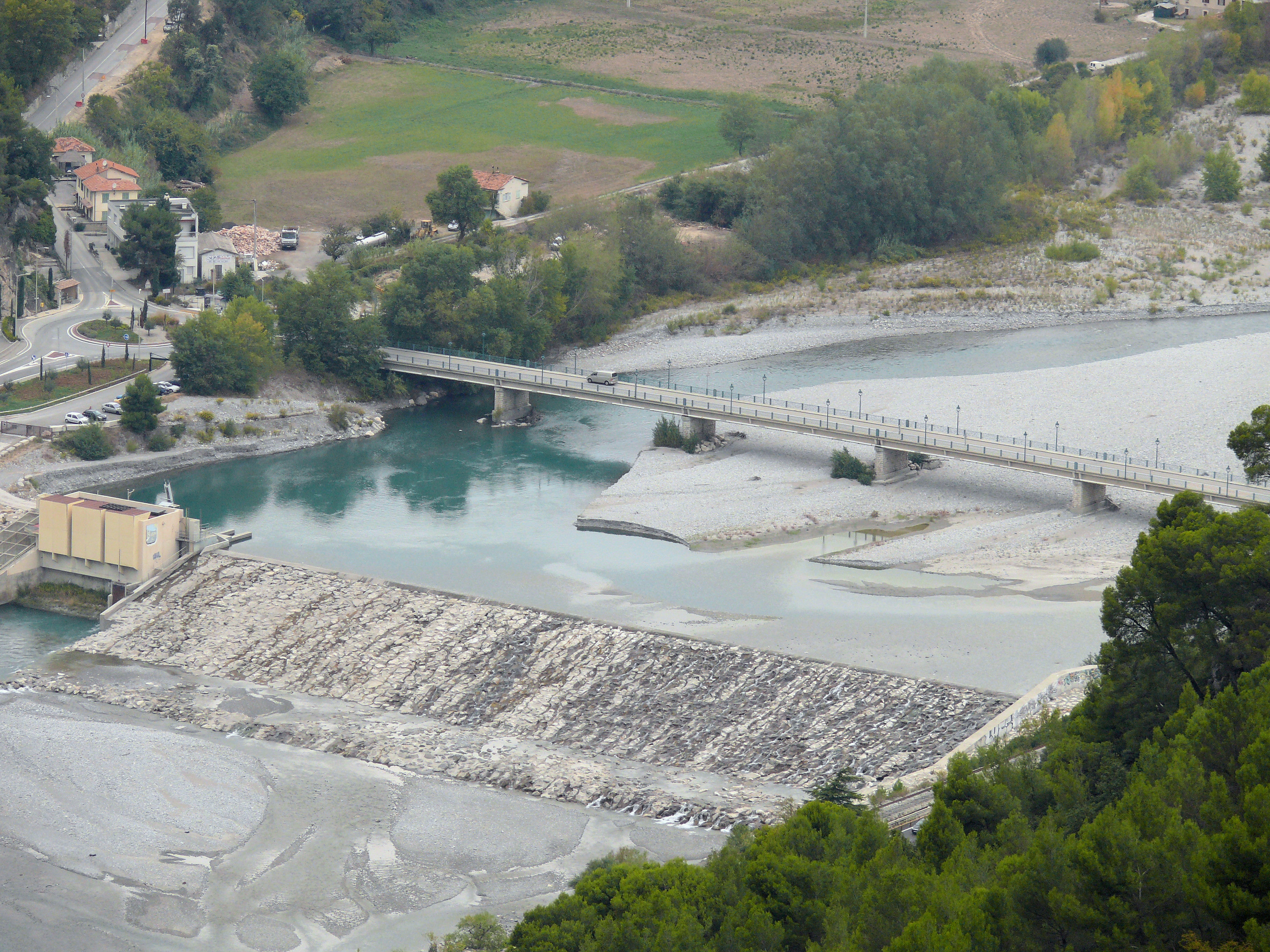 La Roquette-sur-Var - Vue sur le pont Charles-Albert sur le Var depuis le point de vue panoramique sur la vallée du Var